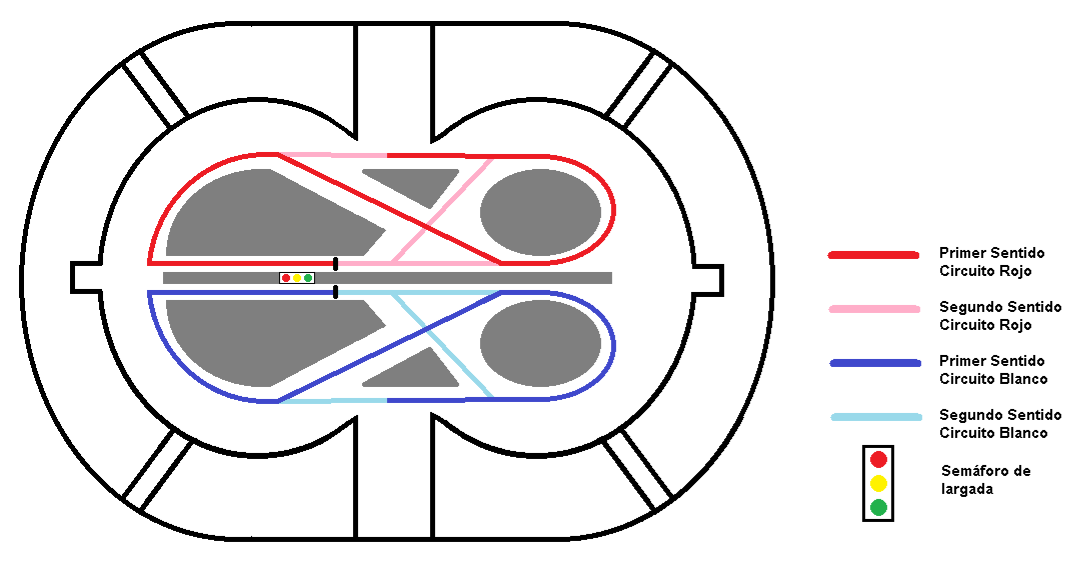 Croquis del circuito semipermanente del Estadio Único Ciudad de La Plata, diseñado para la categoría Súper TC 2000.